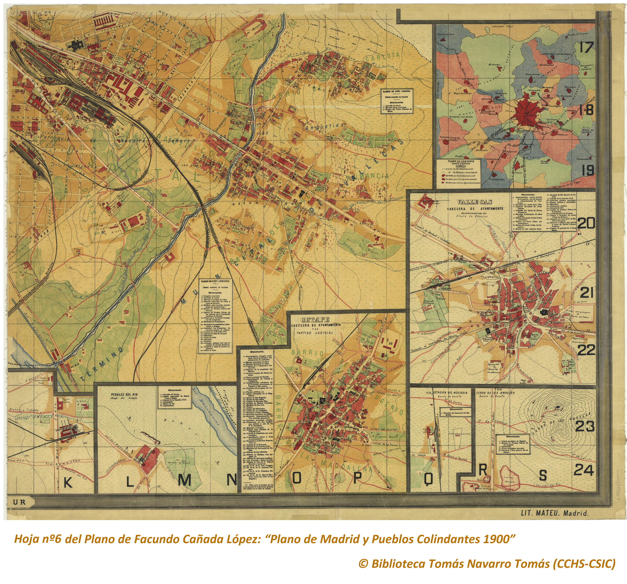 Hoja 6 del Plano de Madrid en 1900, dibujado por Facundo Cañada. Descripción física del plano total por el autor: "El plano consta de 6 hojas, cada una de las cuales mide 59 cm de altura por 72 cm de ancho (de trabajo, por supuesto, nada de anchos de cenefas), y, por lo tanto, al unirlas forman un plano que mide 1,44 metros de ancho y 1,77 de alto y las márgenes en blanco: se está tirando escrupulosamente en ocho colores y en superior papel, hallándose perfectamente grabado" (Facundo Cañada López, 1900). Descripción cartográfica del plato total: Plano de Madrid y Pueblos colindantes de Aravaca, Canillas, Canillejas, Carabanchel Alto, Carabanchel Bajo, Chamartín, El Pardo (Real Sitio), Fuencarral, Getafe, Hortaleza, Leganés, Pozuelo de Alarcón, con sus barrios de Húmera y Estación; Vallecas, Vicálvaro, Villaverde, etc, al principiar el siglo XX. El plano va acompañado de una Guía, con el Directorio de Madrid y otras notas aclaratorias. Información estadística y nomenclator del plano por el autor: La superficie del término municipal de Madrid de la época es de 821.189.581 pies cuadrados, equivalentes a 18.621 fanegas del marco de Madrid o sean 6475 hectáreas y 54 áreas; resultando de dicha superficie una proporción de 120,52 metros cuadrados por habitante, pues estos son 528.984, según el último empadronamiento general verificado en 1º de Diciembre de 1900. En el plano se fijan los nombres de las plazas, calles, callejones, cuestas, etc., que en la actualidad tienen, detallándose la numeración que a cada casa corresponde, dentro de cada manzana, pues se fijan los primeros y últimos números de cada una de éstas al principiar las calles, y después los últimos en las manzanas sucesivas, y de esta manera resulta toda la numeración de cada calle.